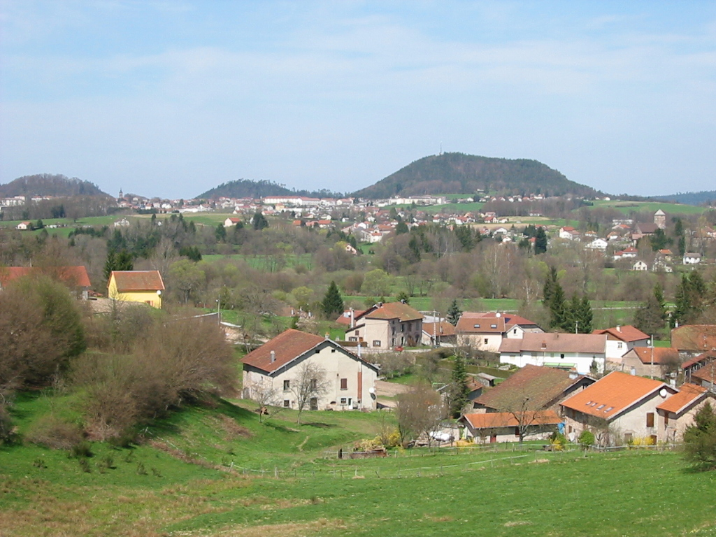 Paysage des Vosges, canton de Bruyères. Vue depuis le lieudit La Cavelure à Fiménil. À droite, l'église romane de Champ-le-Duc et au loin, le chef-lieu de canton. Photo personnelle du 23 avril 2006. Copyright © Christian Amet